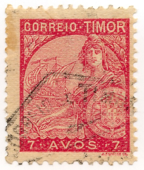 Briefmarke von Portugiesisch-Timor